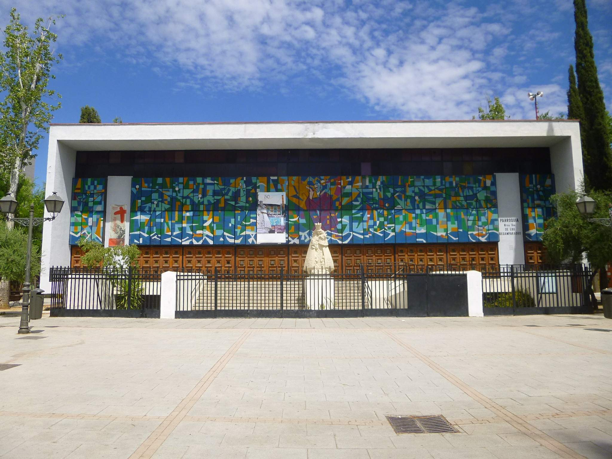 Iglesia de Nuestra Señora de los Desamparados (Villaverde, Madrid)